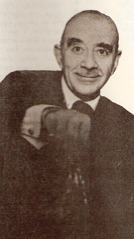 escritor argentino manuel mujica lainez